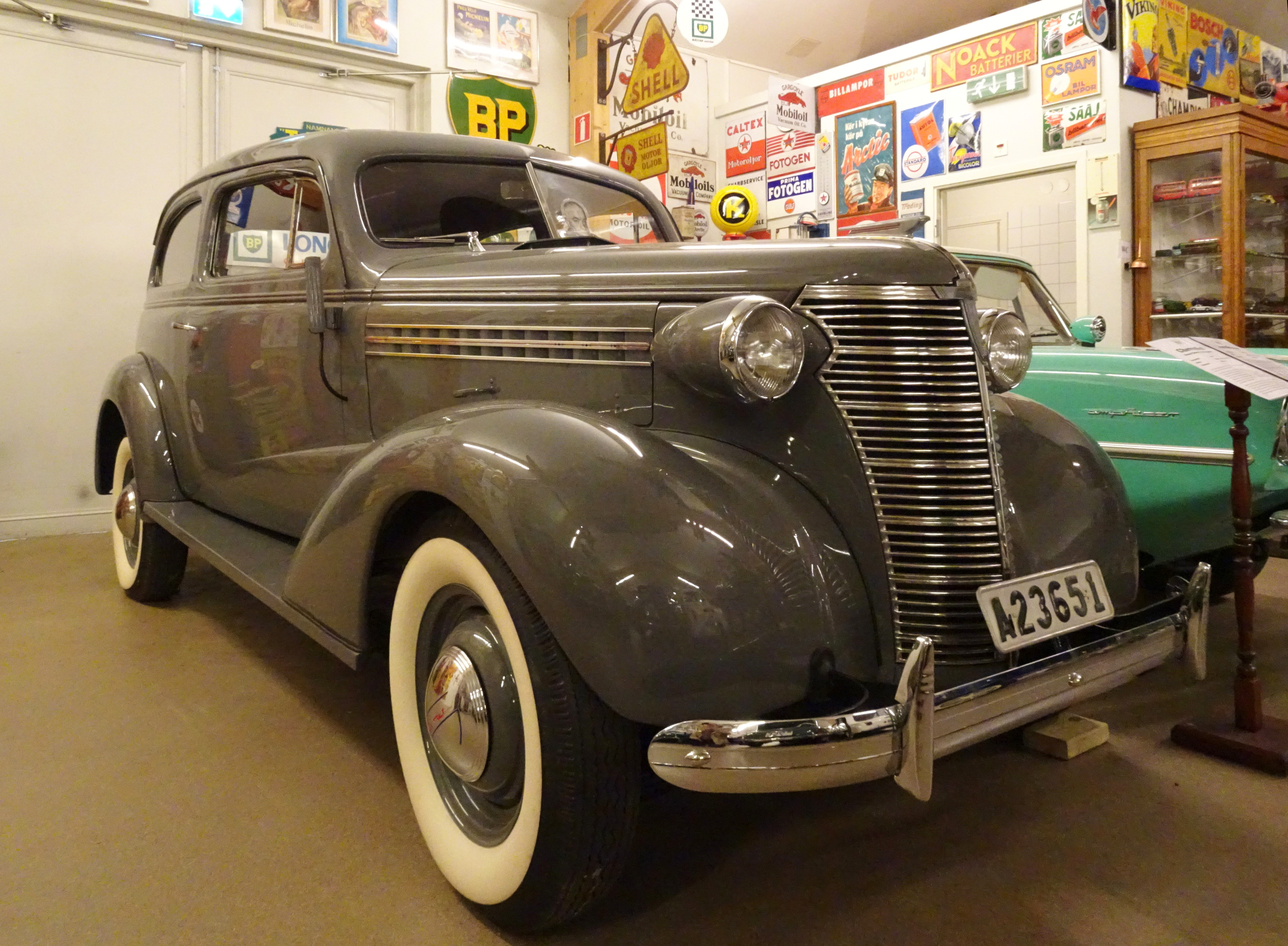 Sparreholms bilmuseum: Chevrolet, Master Deluxe, Town Sedan, 1938. Ägdes av Per Albin Hansson mellan 1938 och 1946